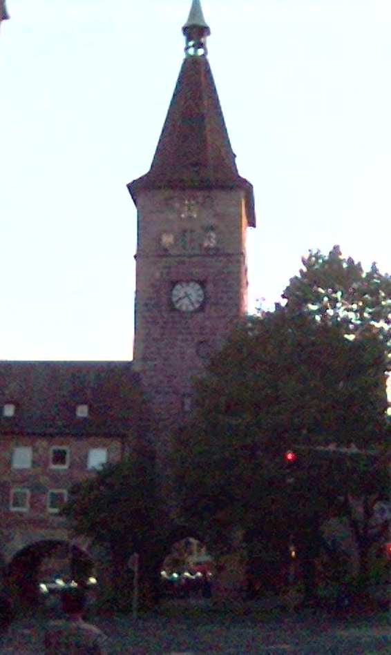 Laufer Schlagturm von Osten, ehemals stadtauswärts gerichtete Seite